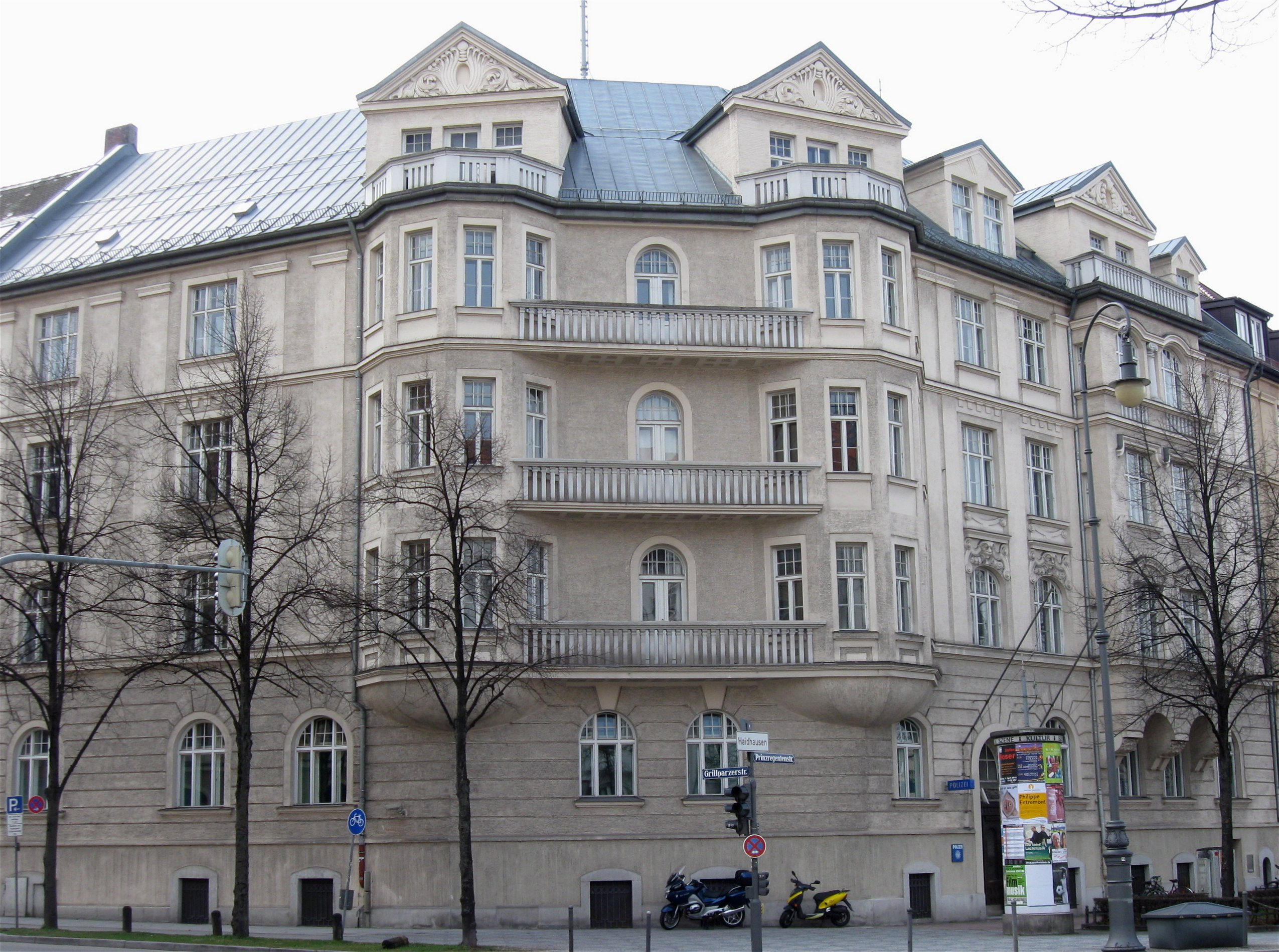 Prinzregentenplatz 16; Eckhaus, barockisierender Jugendstil, reich gegliedert und dekoriert, um 1908-09 von Franz Popp; bildet Block mit dem gleichartigen Haus Nr. 14.